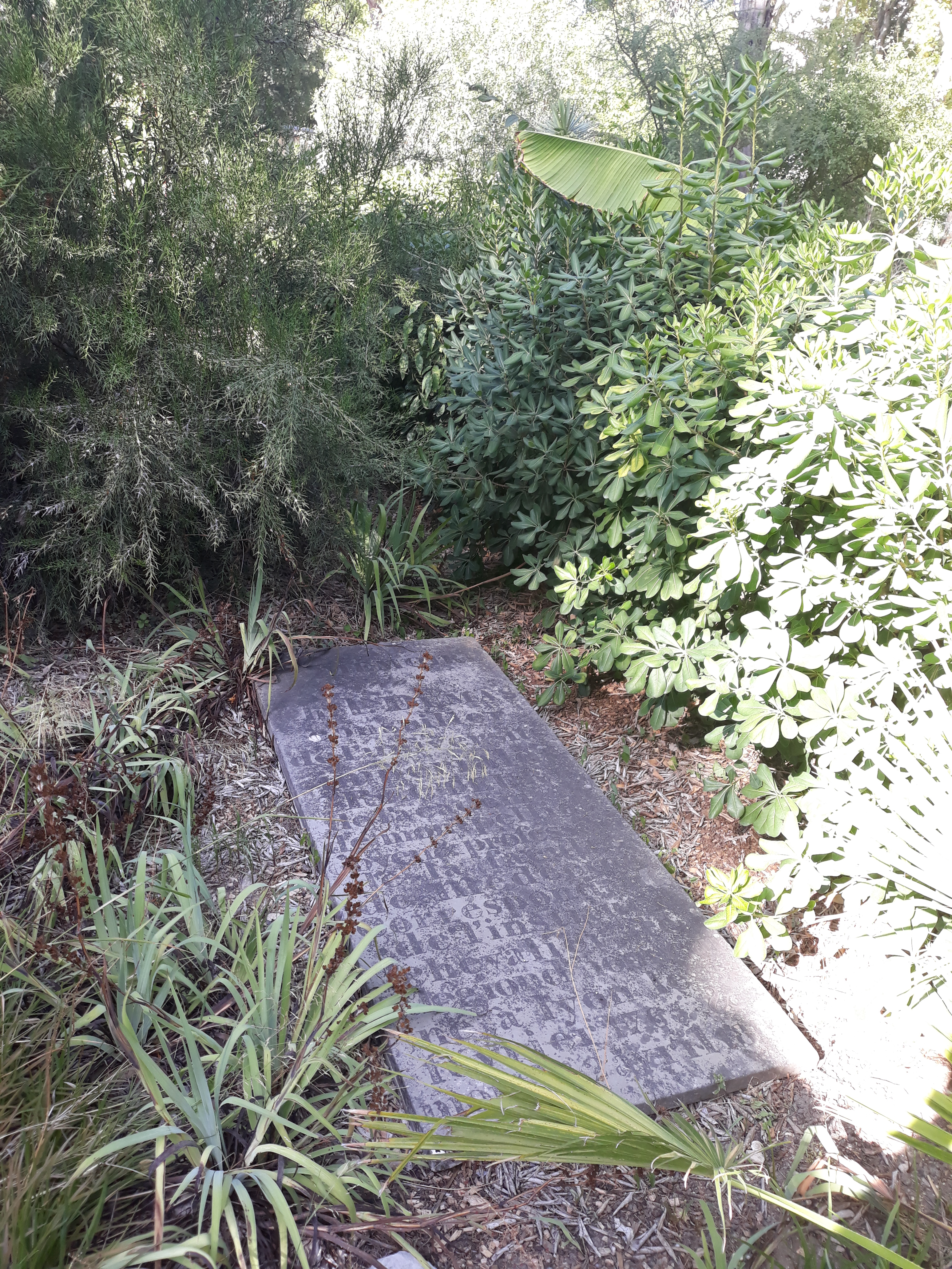 Das Grab des französischen Botanikers Charles-Louis Dumas im Botanischen Garten Montpellier.